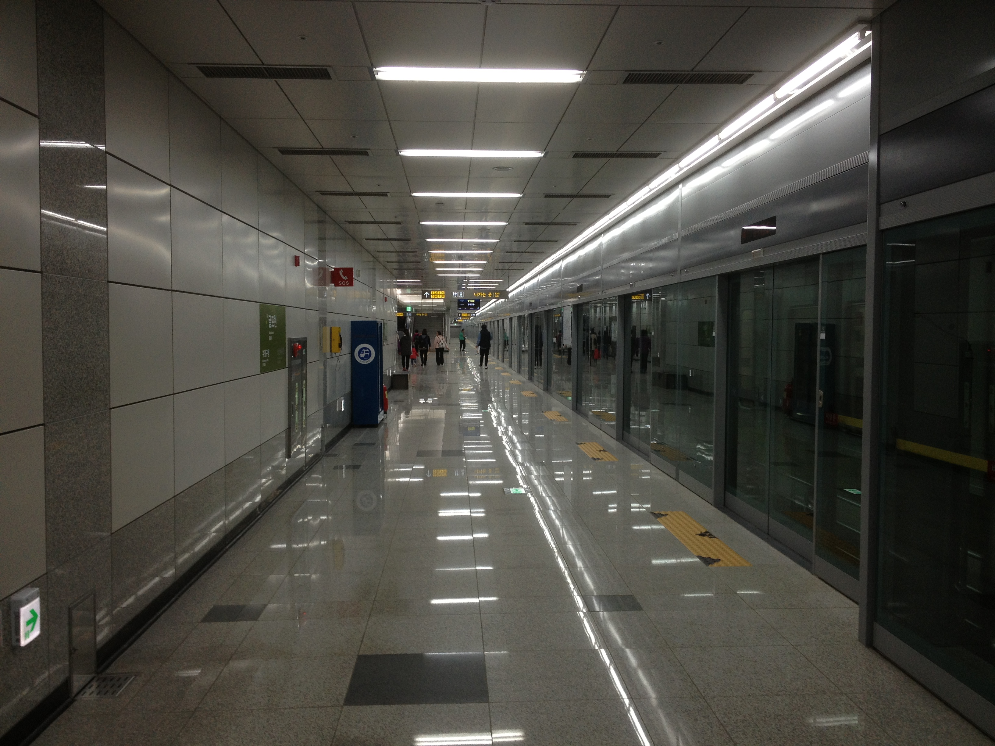 굴포천역 승강장